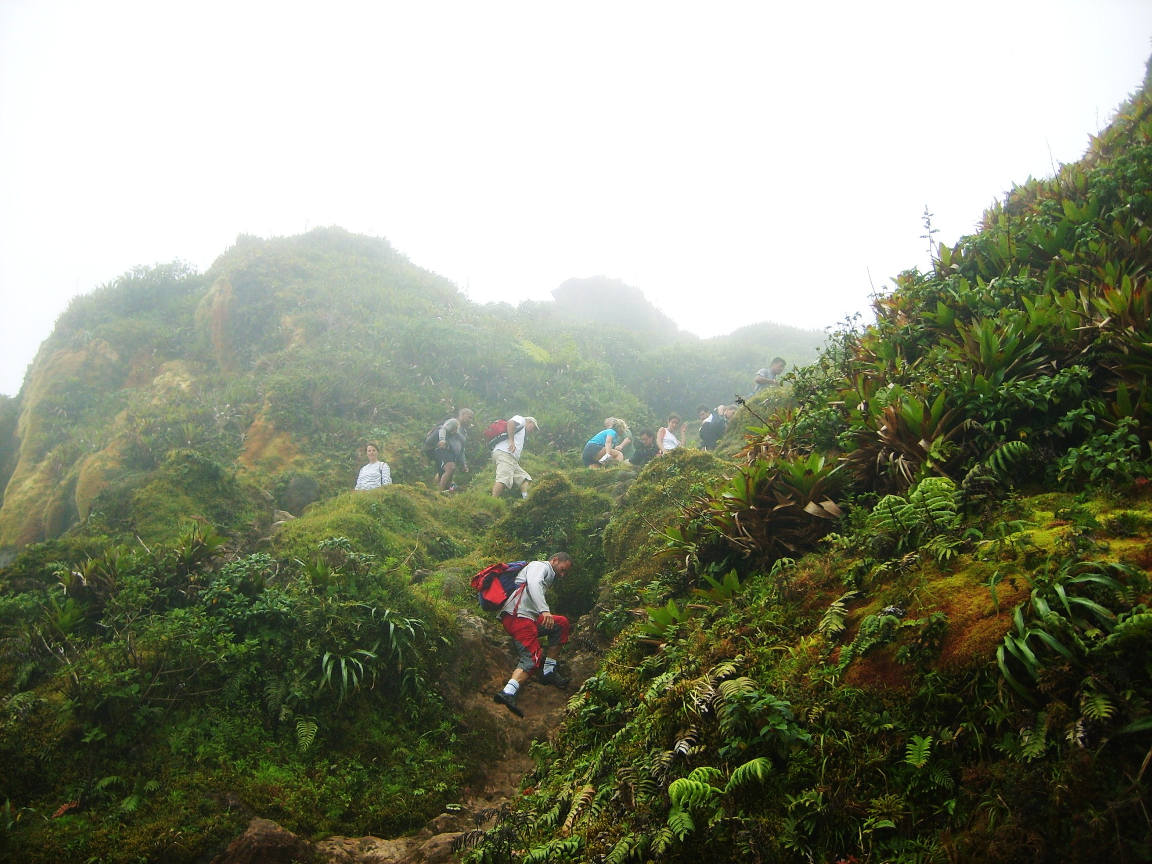 La montée vers le dôme de la soufrière à 200 mètres du sommet (Guadeloupe).